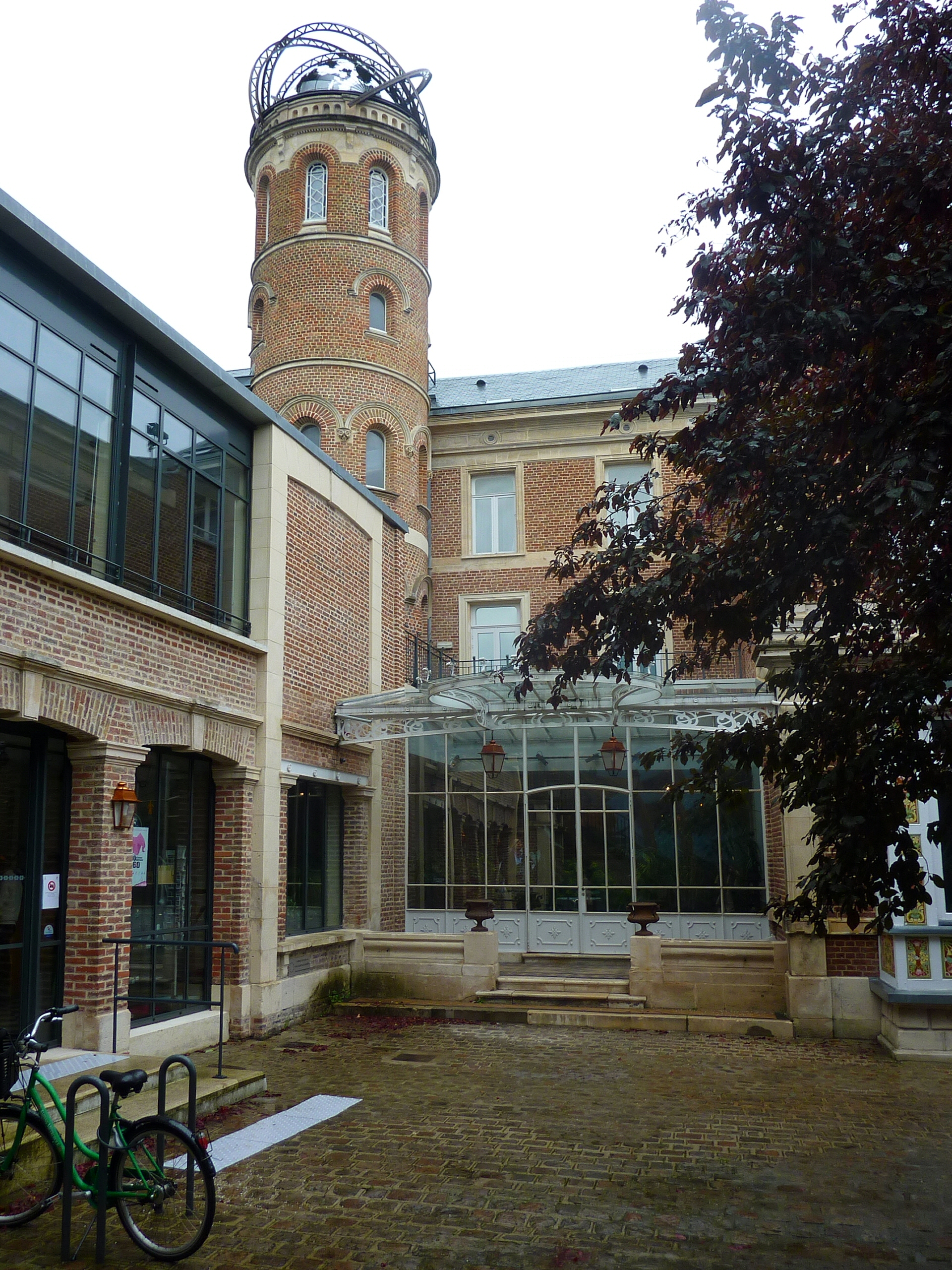 Musée Jules Verne Amiens Somme France